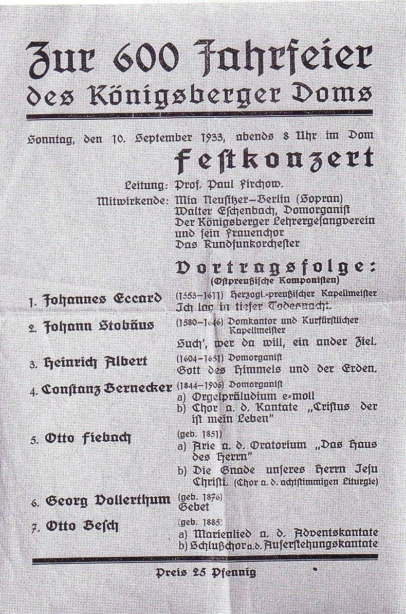 Programm zur 600-Jahrfeier des Königsberger Doms (10. September 1933)